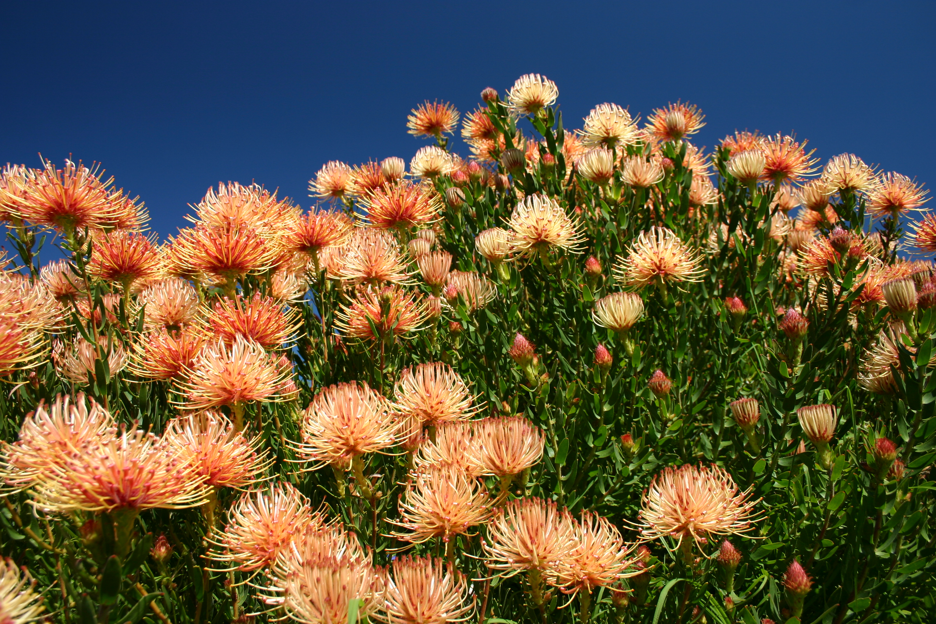 Leucospermum tottum